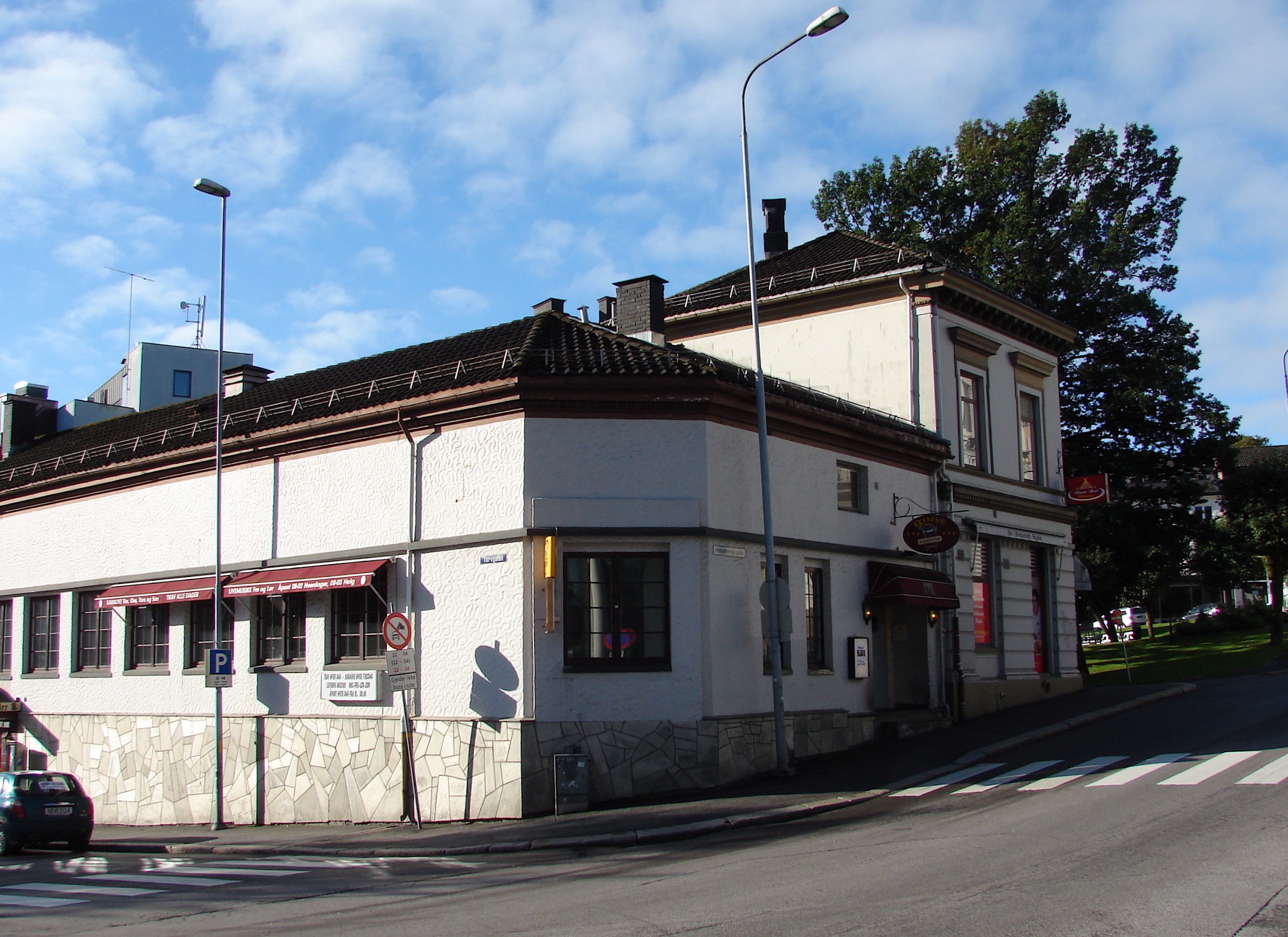 Bodegaen „Gimle Pub“ i Hesselbergs Gate, ved Landmandstorvet i Skien, Telemark